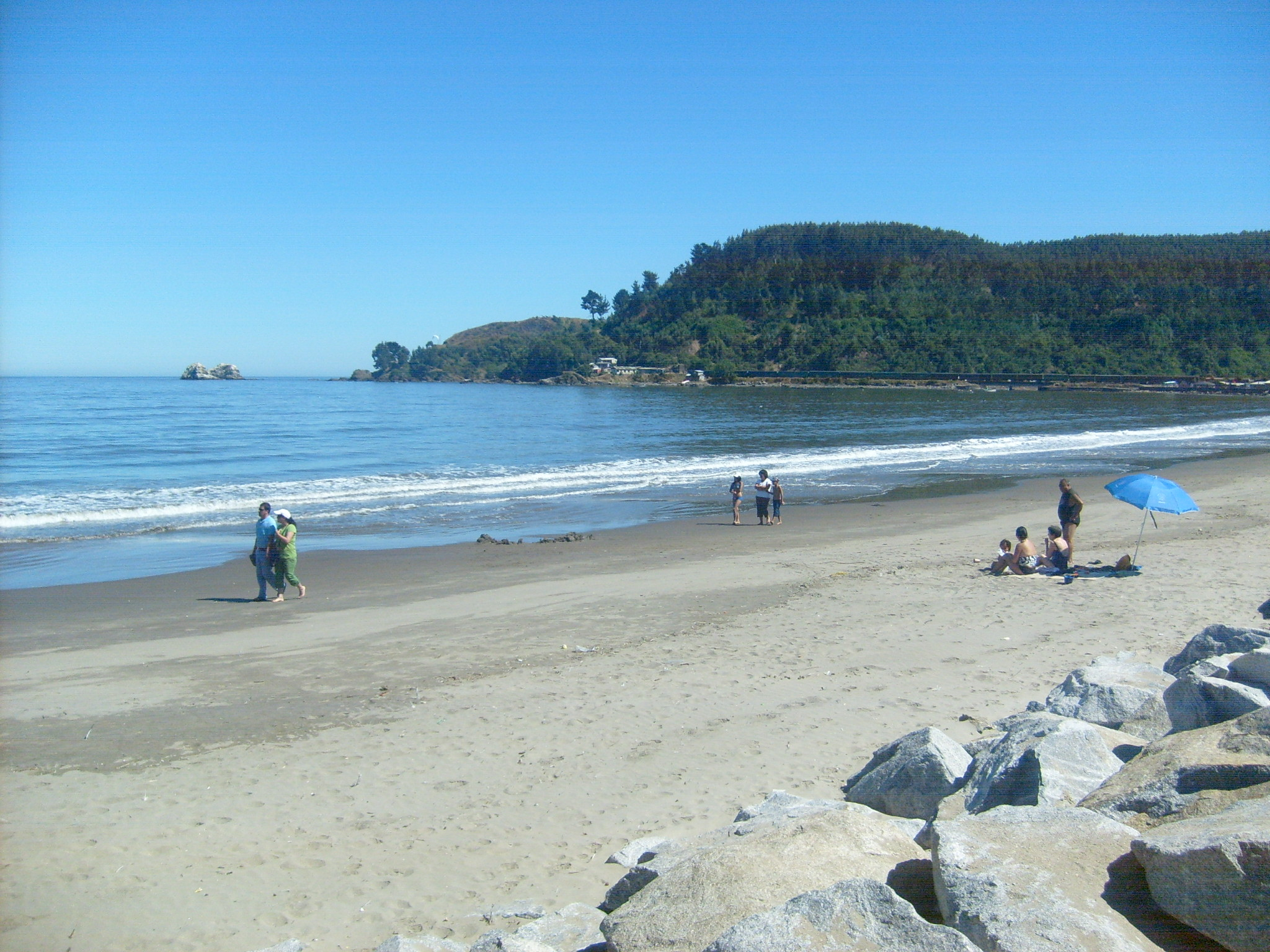 La Playa de Colcura es una de las mas visitas y atractivas de la Cuenca del Carbón. Región del Bío-Bío (Chile)